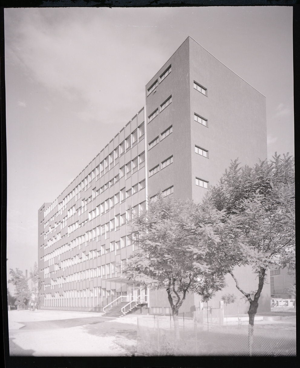 Servizio fotografico : Sesto San Giovanni, 1963 / Paolo Monti. - Buste: 37, Fototipi: 37 : Negativo b/n, gelatina bromuro d'argento/ pellicola ; 10x12. - ((Serie costituita da 37 negativi identificati con i nn.: 7264-7300. La suddetta serie è contenuta nella scatola identificata con la numerazione G7201/7600. - di Paolo Monti: Archivio fino 1-4-1961/ 31-3-1963 (1961-1963), presso Archivio Paolo Monti. - Fonte: Rubrica